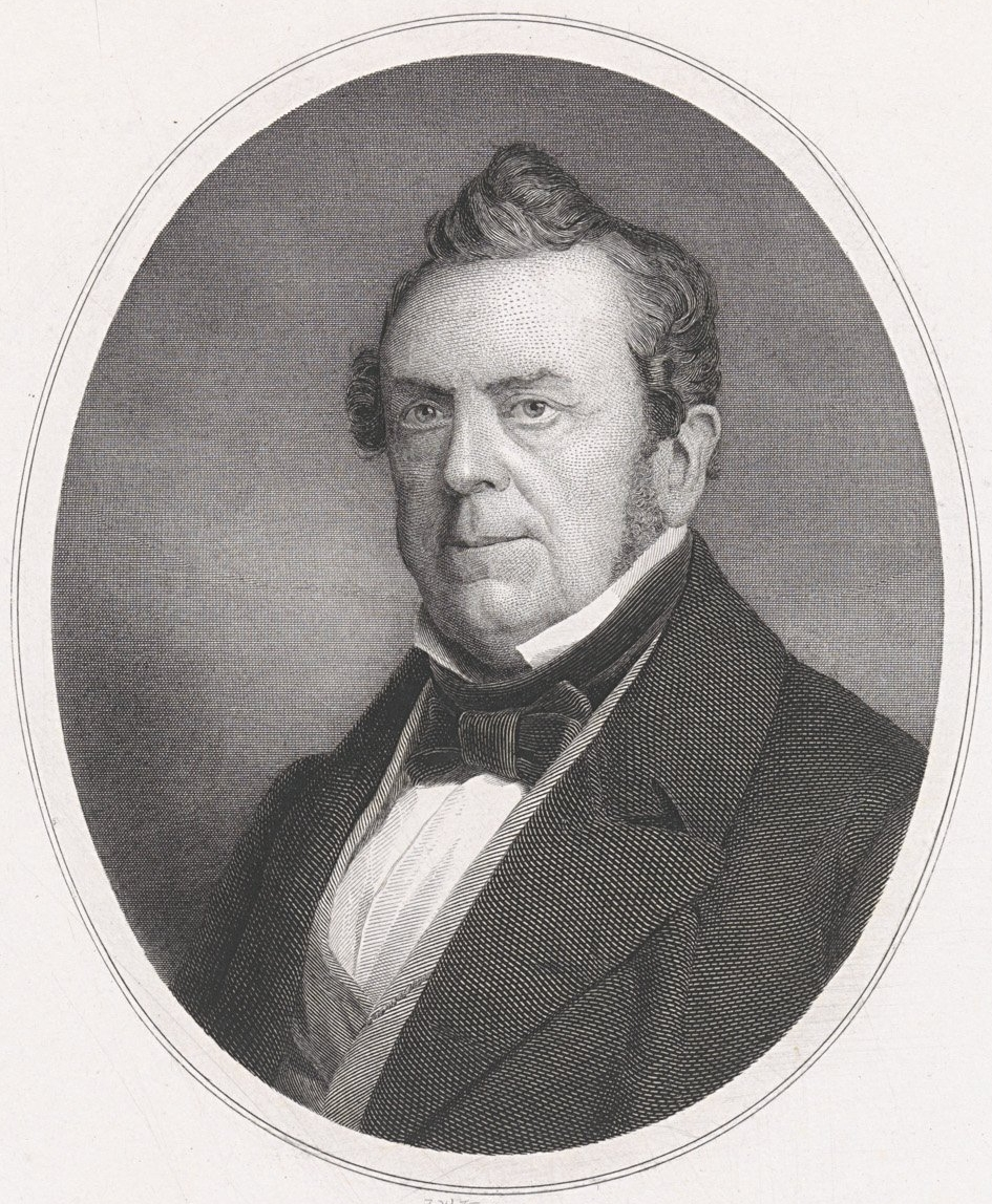 Portret van Christiaan Kramm vervaardigd door J.W. Kaiser in 1864